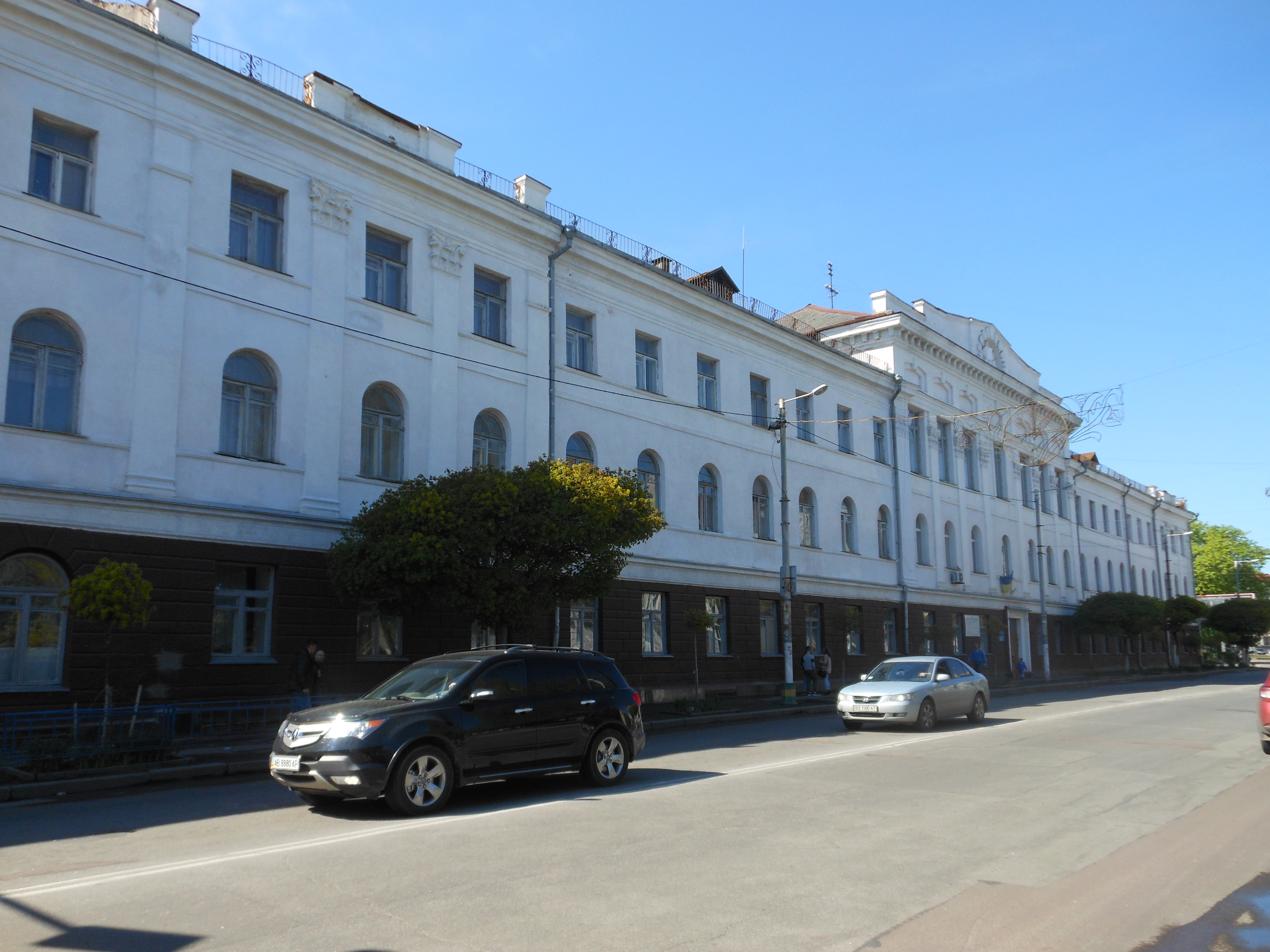 Будинок Житомирського автошляхового технікуму, Житомир, вул. В. Бердичівська, 2